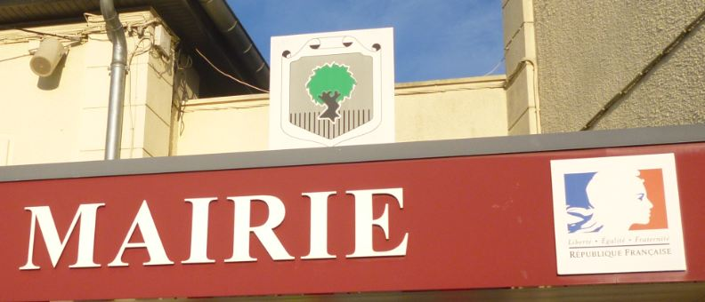 Blason de la commune sur le fronton de la Mairie